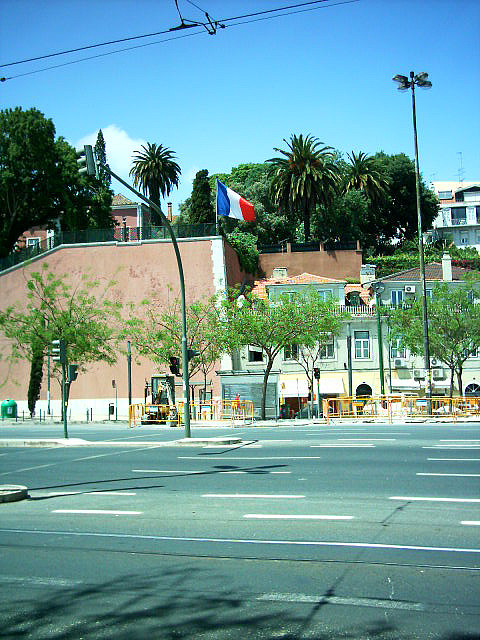 Embaixada da França em Lisboa